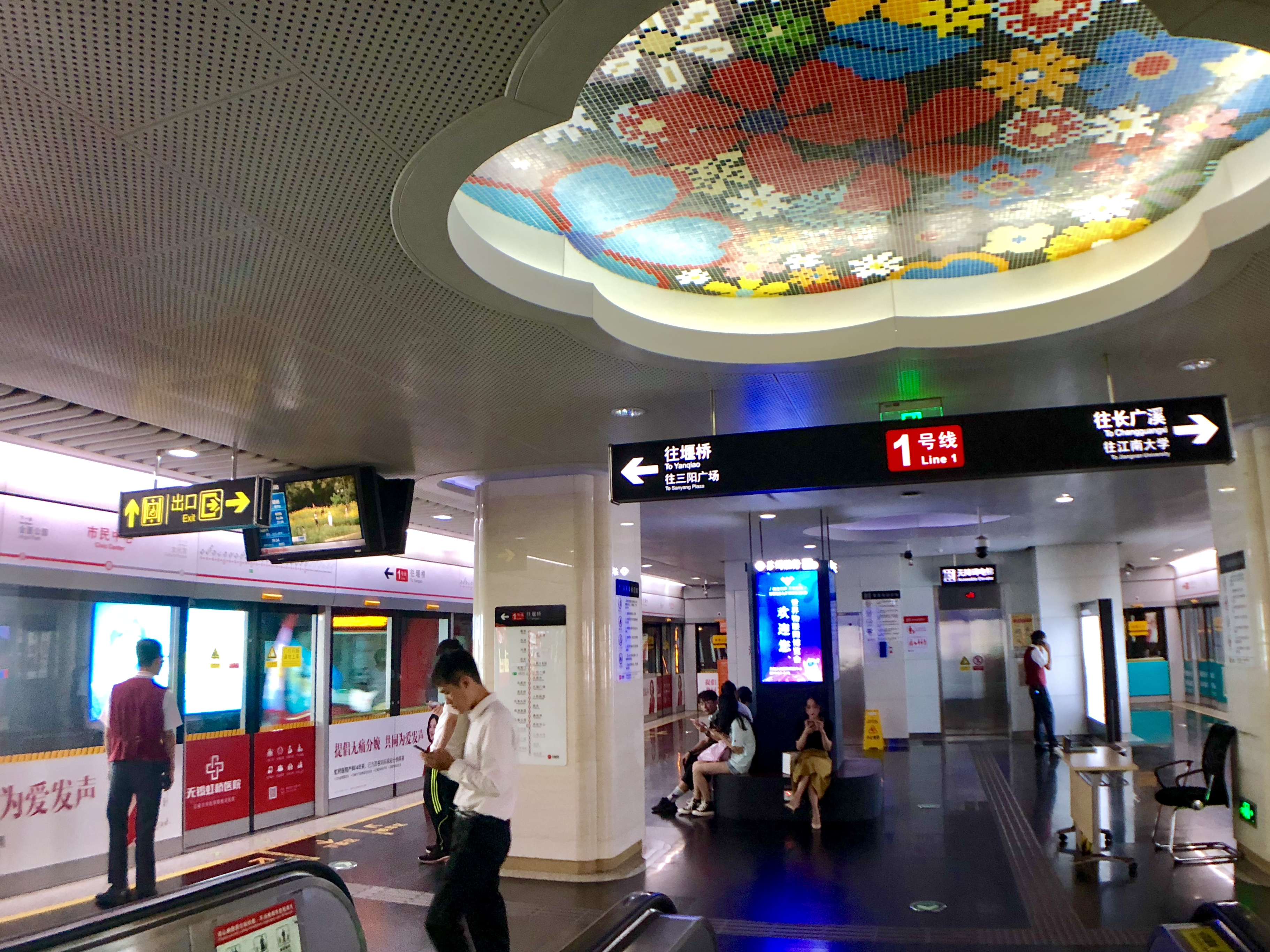 無錫地鐵市民中心站1號線站台